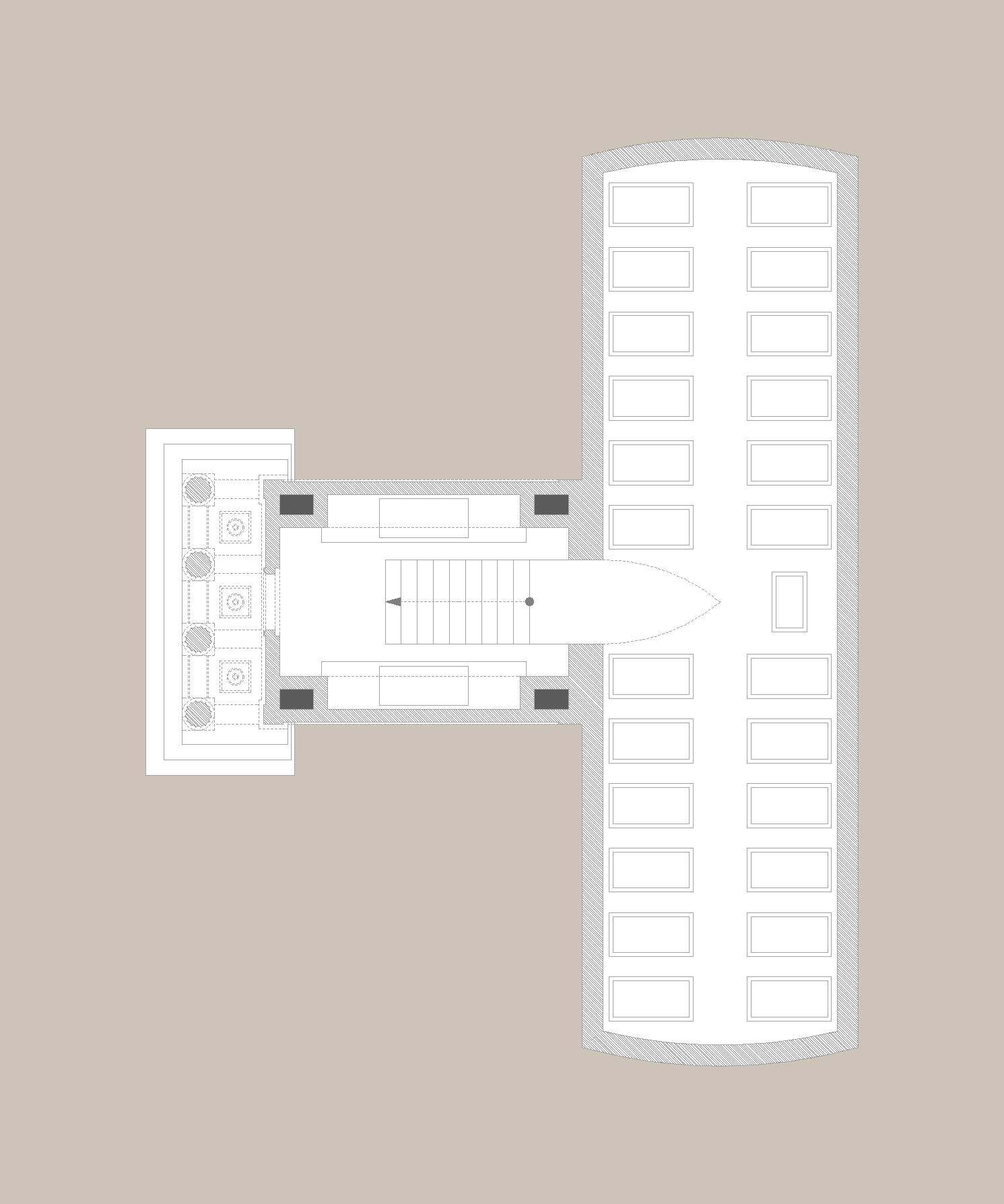 Mausoleum der Familie von Hoym, Grundriss. © Eiko Behrens